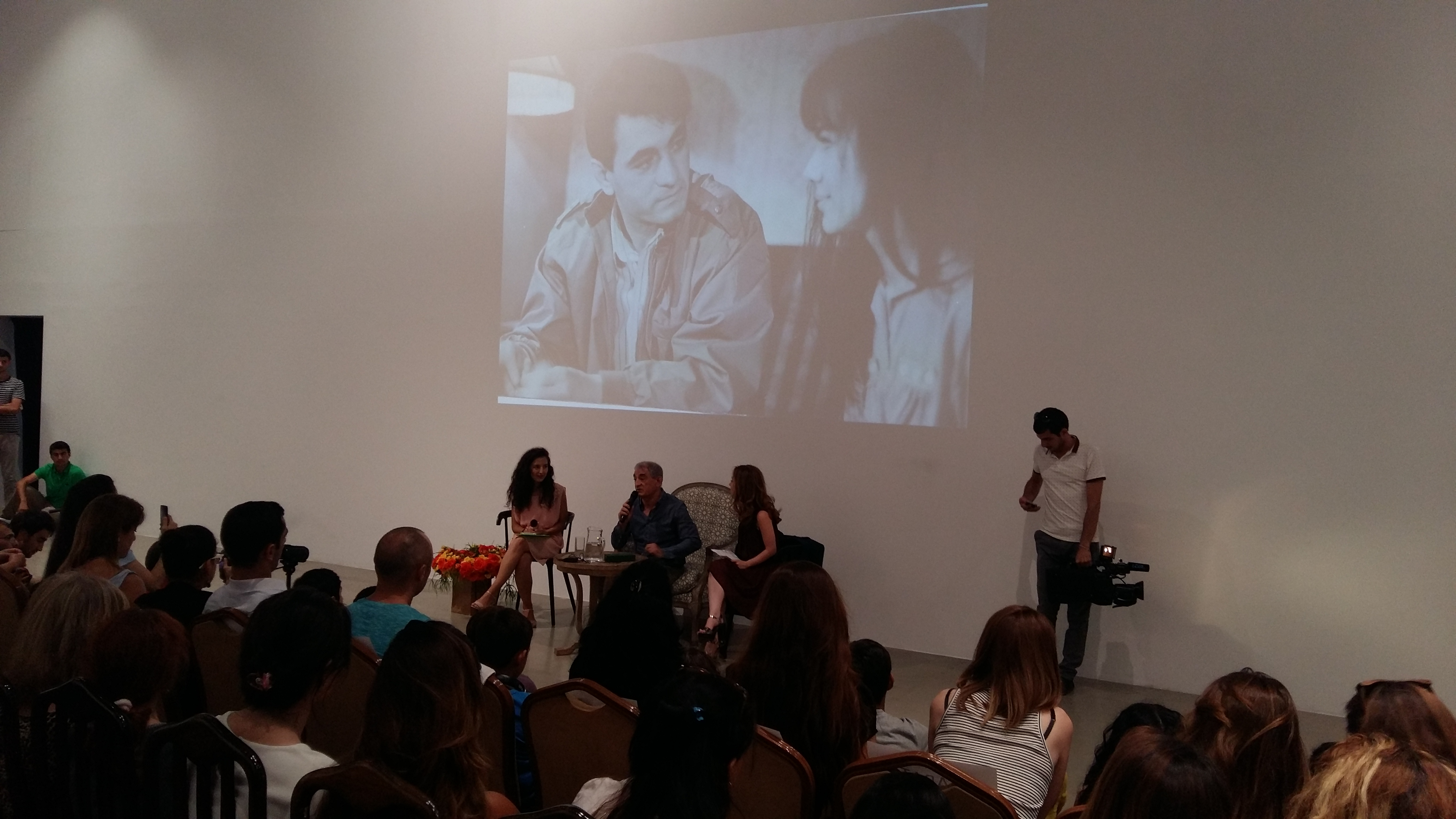 Fəxrəddin Manafov